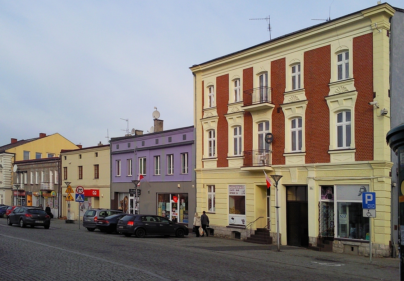 Kamienice w czeladzkim rynku. Na przełomie 2006 i 2007 roku rozpoczęła się podzielona na kilka etapów rewitalizacja starego miasta. Prace polegały na wymianie infrastruktury technicznej, czyli sieci kanalizacyjnej, wodociągowej i telekomunikacyjnej. Dodatkowo wybrukowano drogi i chodniki. wymieniona została również płyta rynku, na której powstała infrastruktura.